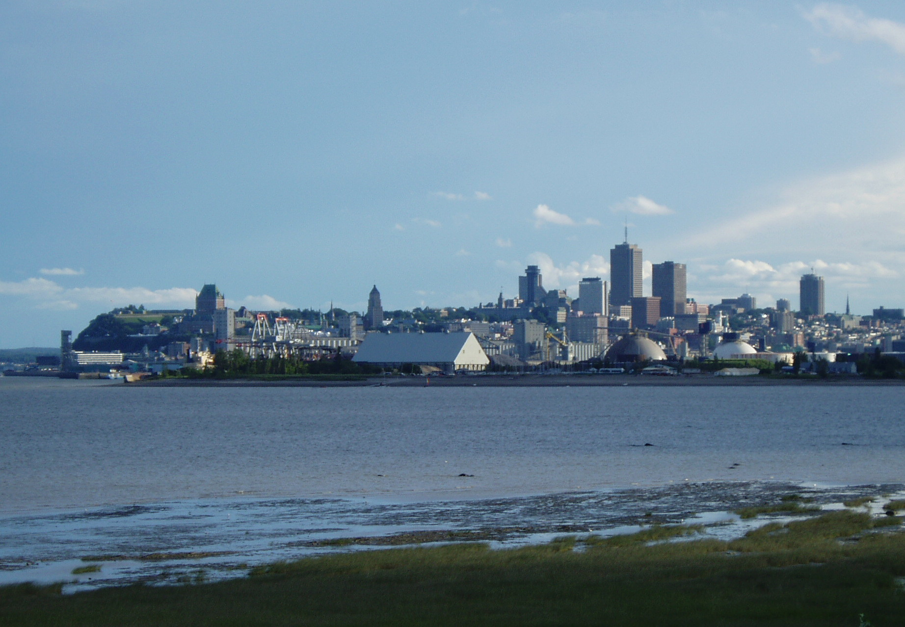 Die Skyline der Stadt Québec: Links das Château Fontenac und der Anfang der Plaines d'Abraham.